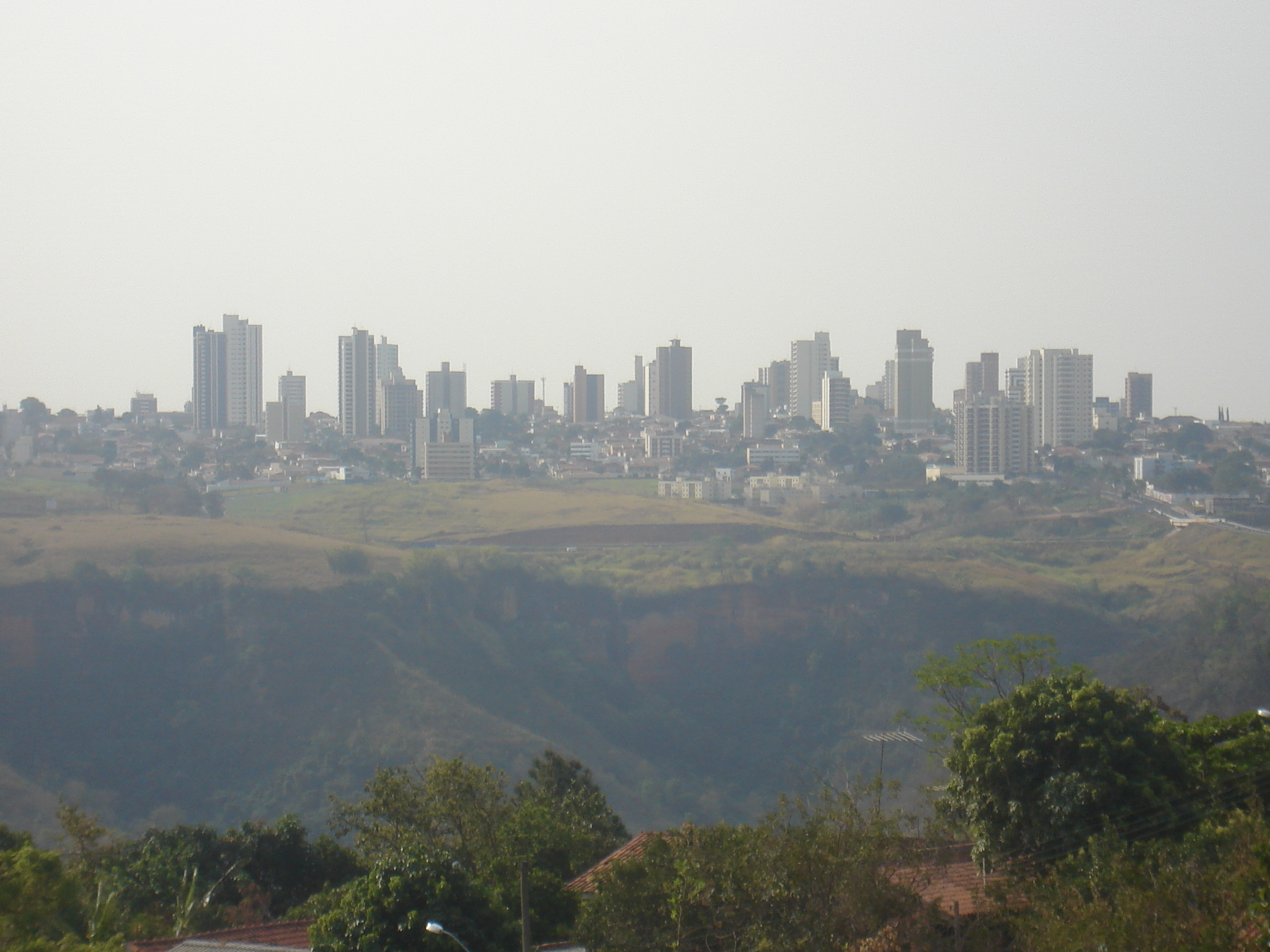 Marília's skyline, São Paulo, Brazil - Panorama de Marília, São Paulo, Brasil